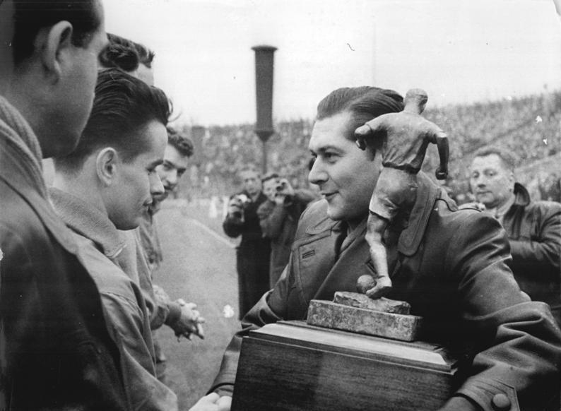 Zentralbild-Wendorf-Zastrow 23.11.58 ASK Vorwärts siegte auch über Wismut - Im Jahn-Stadion Berlin konnte der ASK-Vorwärts auch dem SC Wismut Karl-Marx-Stadt am 23.11.58 mit 2:0 Toren das Nachsehen geben. Vor dem Spiel fand durch Dr. H. Schuster (Staatliches Komitee) die Auszeichnung des neuen Deutschen Fußballmeisters statt. UBz.: Dr. H. Schuster vom Staatlichen Komitee gratuliert dem Mannschaftskapitän "Wibbel" Wirth zu dem Erfolg und übergibt ihm den Wanderpreis.